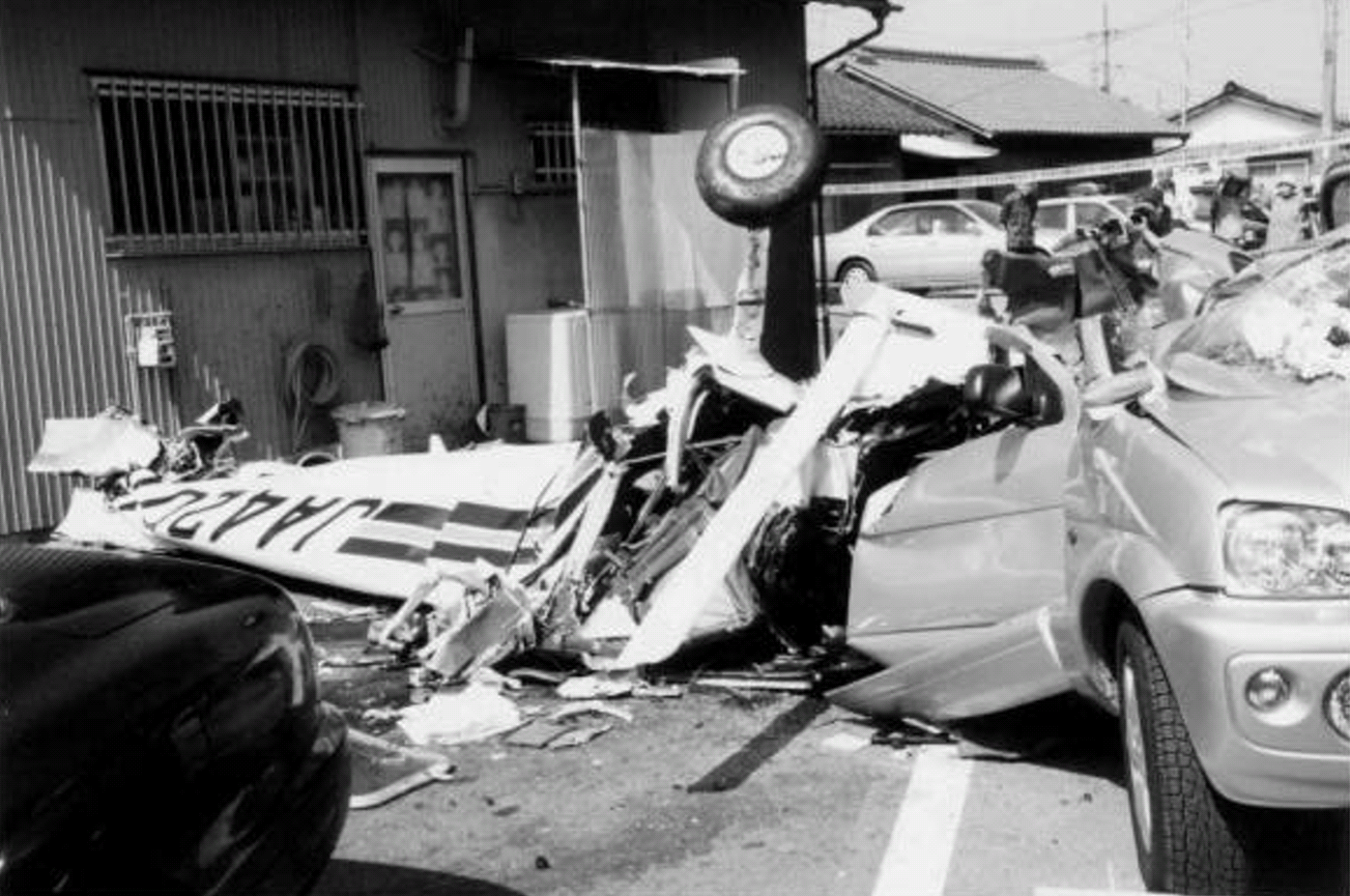 運輸安全委員会の報告書2002-8より